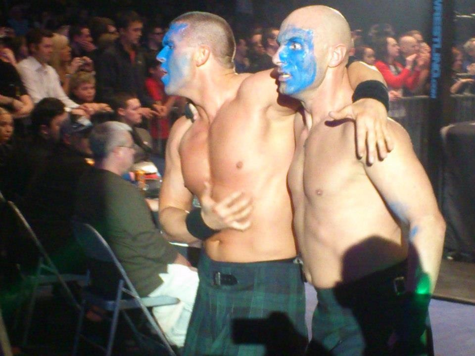 Christopher Daniels & Frankie Kazarian AKA #badinfluence